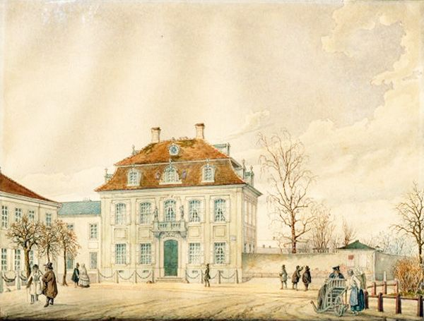 Das Weinnäpfchen in Leipzig. Aquarell über Bleistiftvorzeichnung, 192 x 251 mm. (» ›Weinnäpfchen‹ – Chr. Ad. und Emilie Mayers Haus am Augustusplatz, Leipzig)